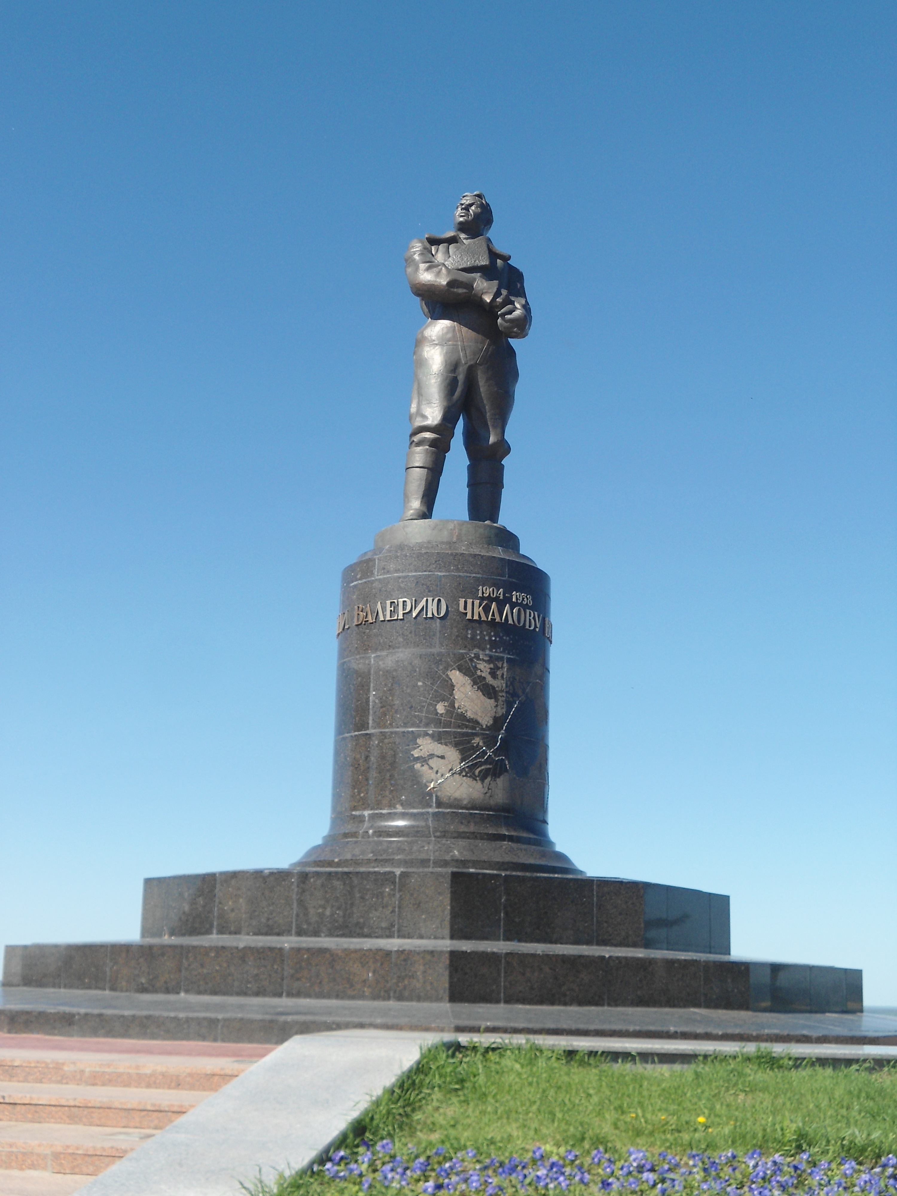 Valery Chkalov monument